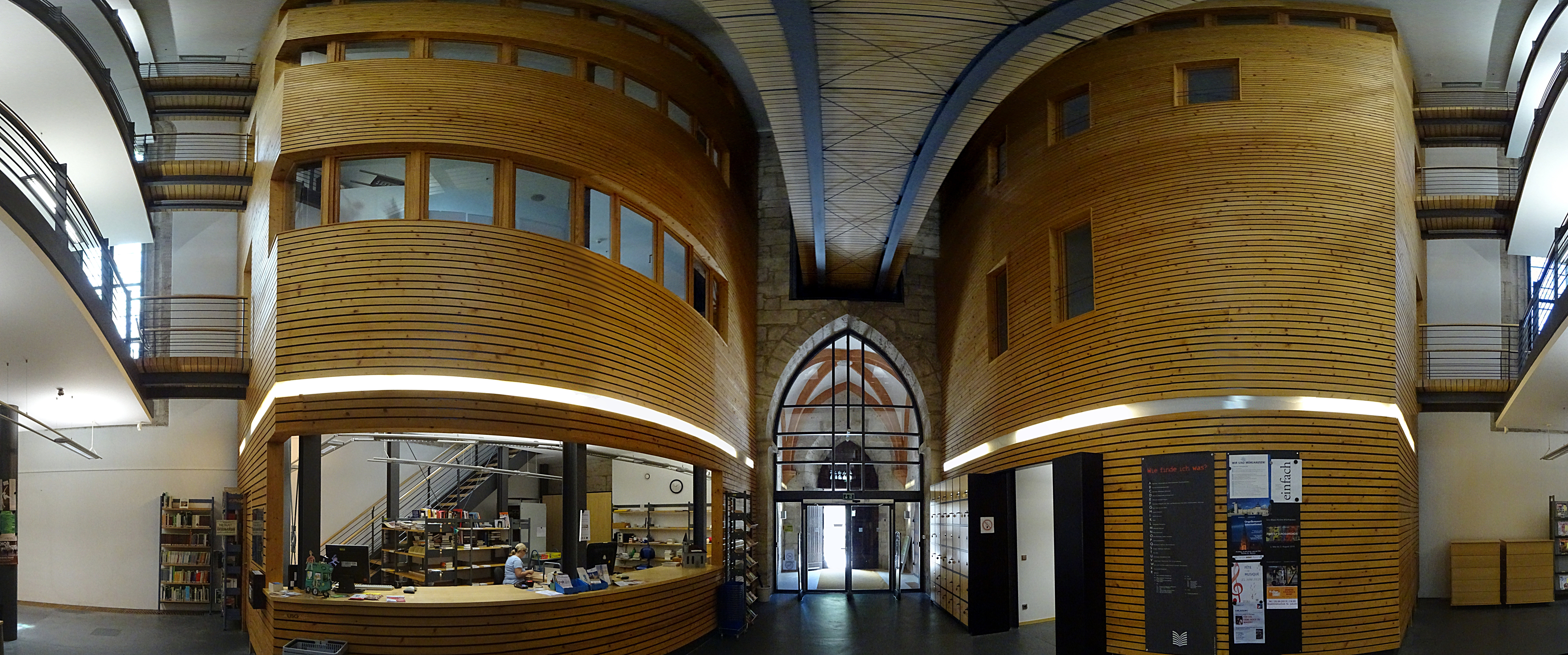 Innenraum Panorama der Stadtbibliothek in der Jacobikirche (Mühlhausen, Thüringen)